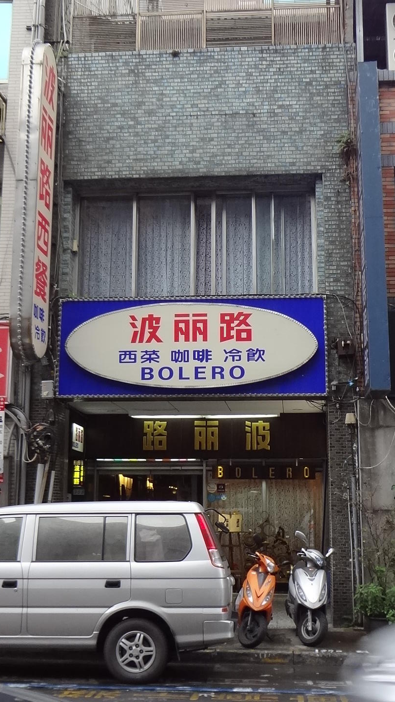 中文（台灣）: 波麗路餐廳，地址：臺北市大同區民生西路308號。